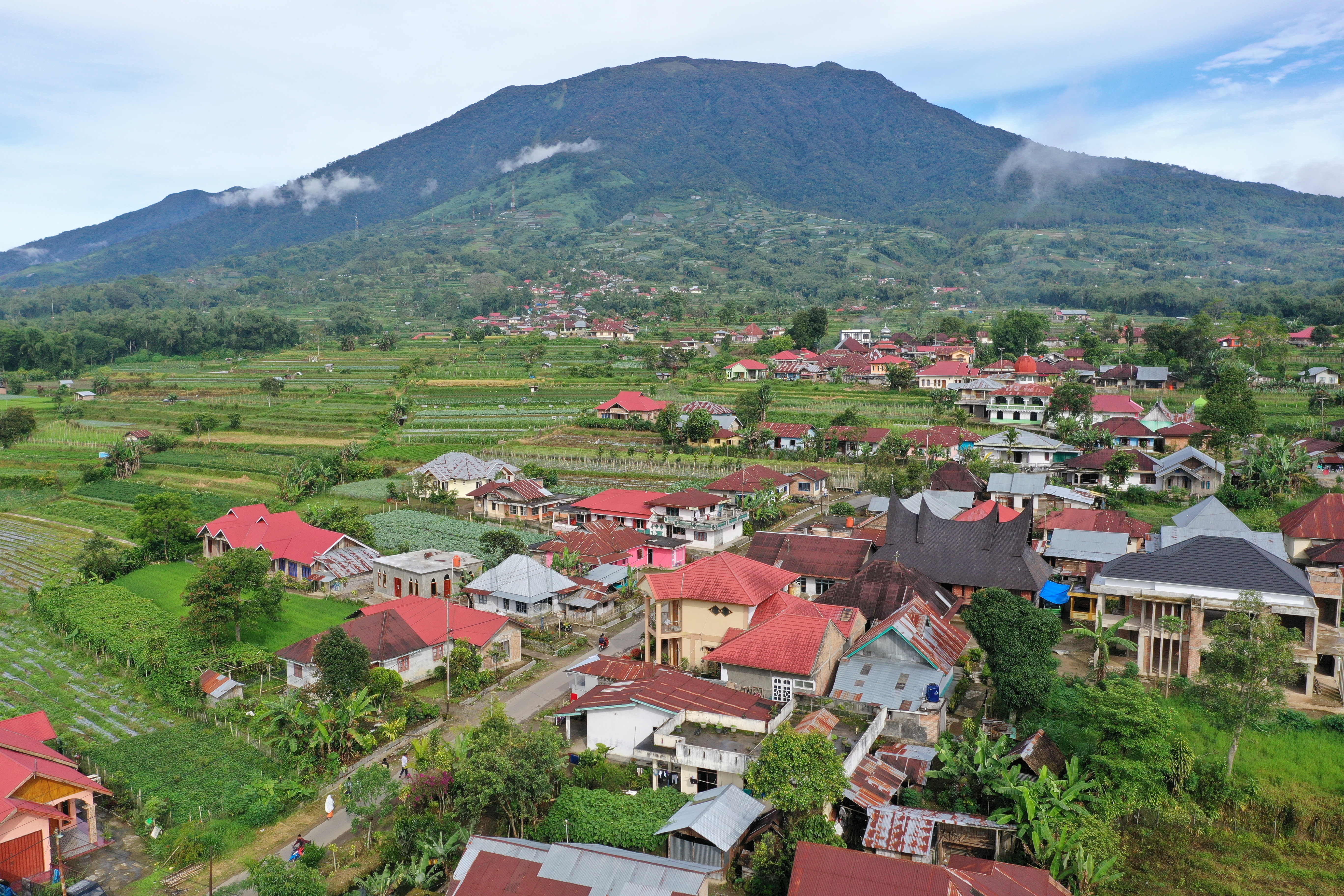 Foto udara Nagari Padang lawah yang terletak di kaki Gunung Singgalan, Pengambilan foto dilaksanakan pada Pagi hari jam 08:42 tanggal 5 Juni 2019